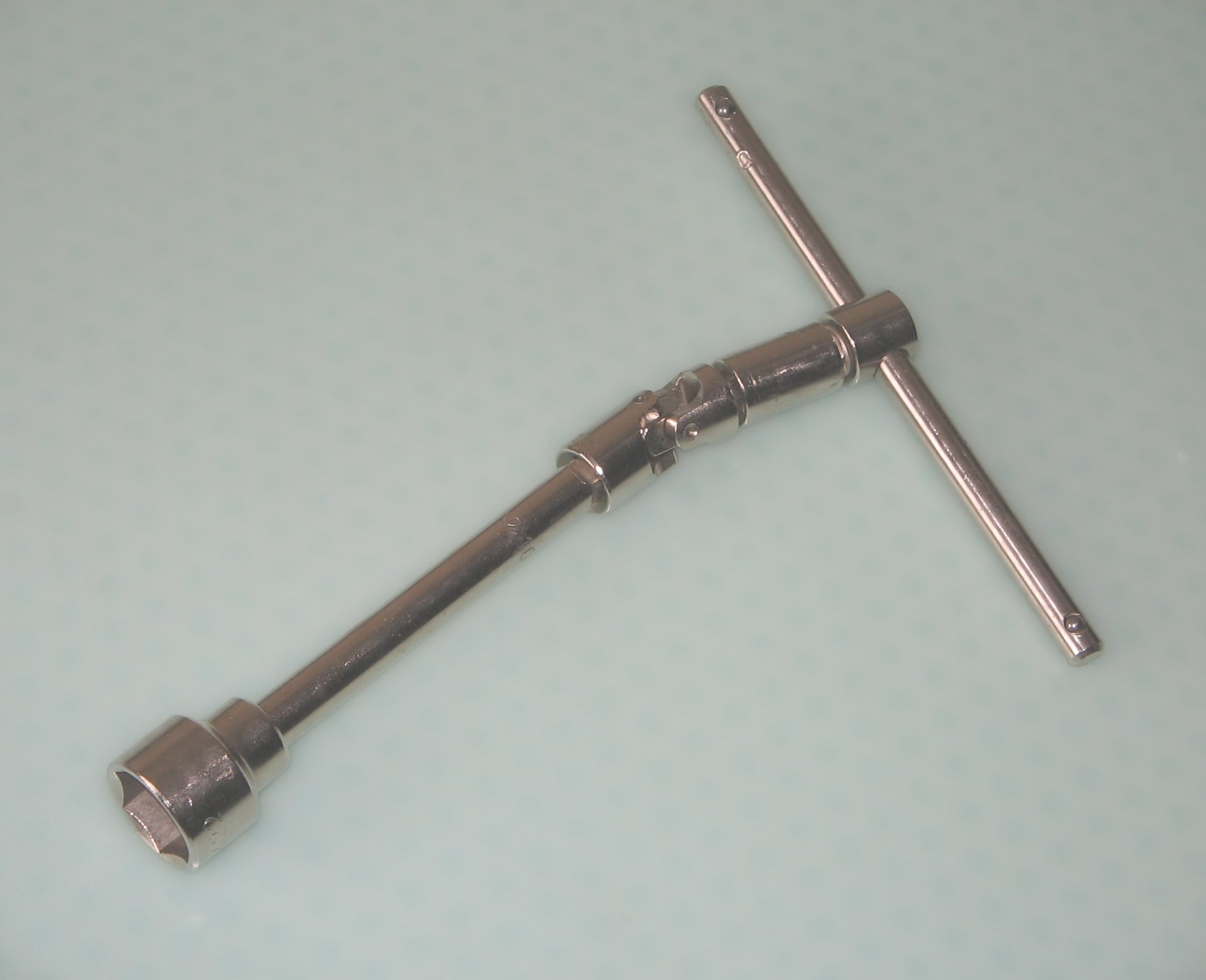 Fina rencxilo, muntita el aro de ajxoj por munti finajn rencxilojn La foto estis farita de mi mem.